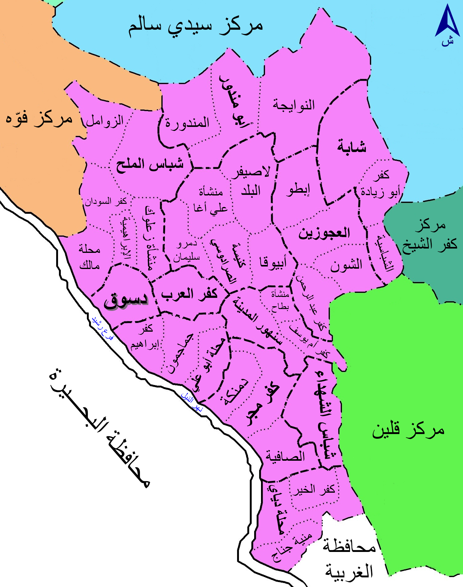 خريطة القرى الرئيسية والقرى التوابع بمركز دسوق، مصر